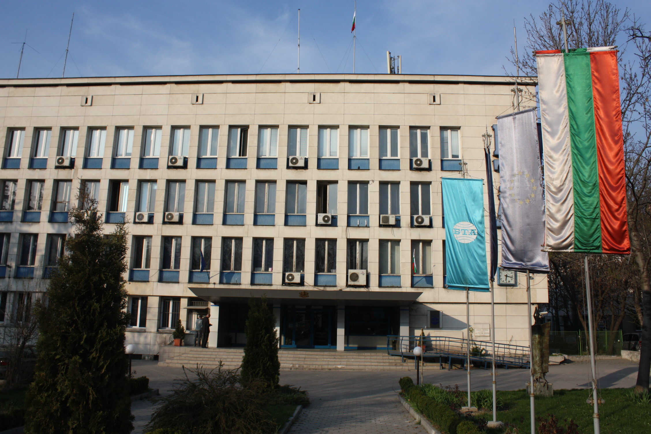 BTA Bulgarian News Agency, БТА, Българска Телеграфна Агенция, Sofia, Bulgaria